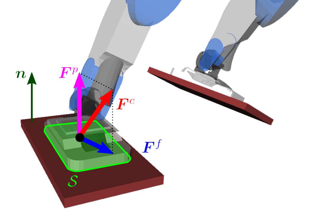 Humanoid robot in single-foot contact with a stepping stone